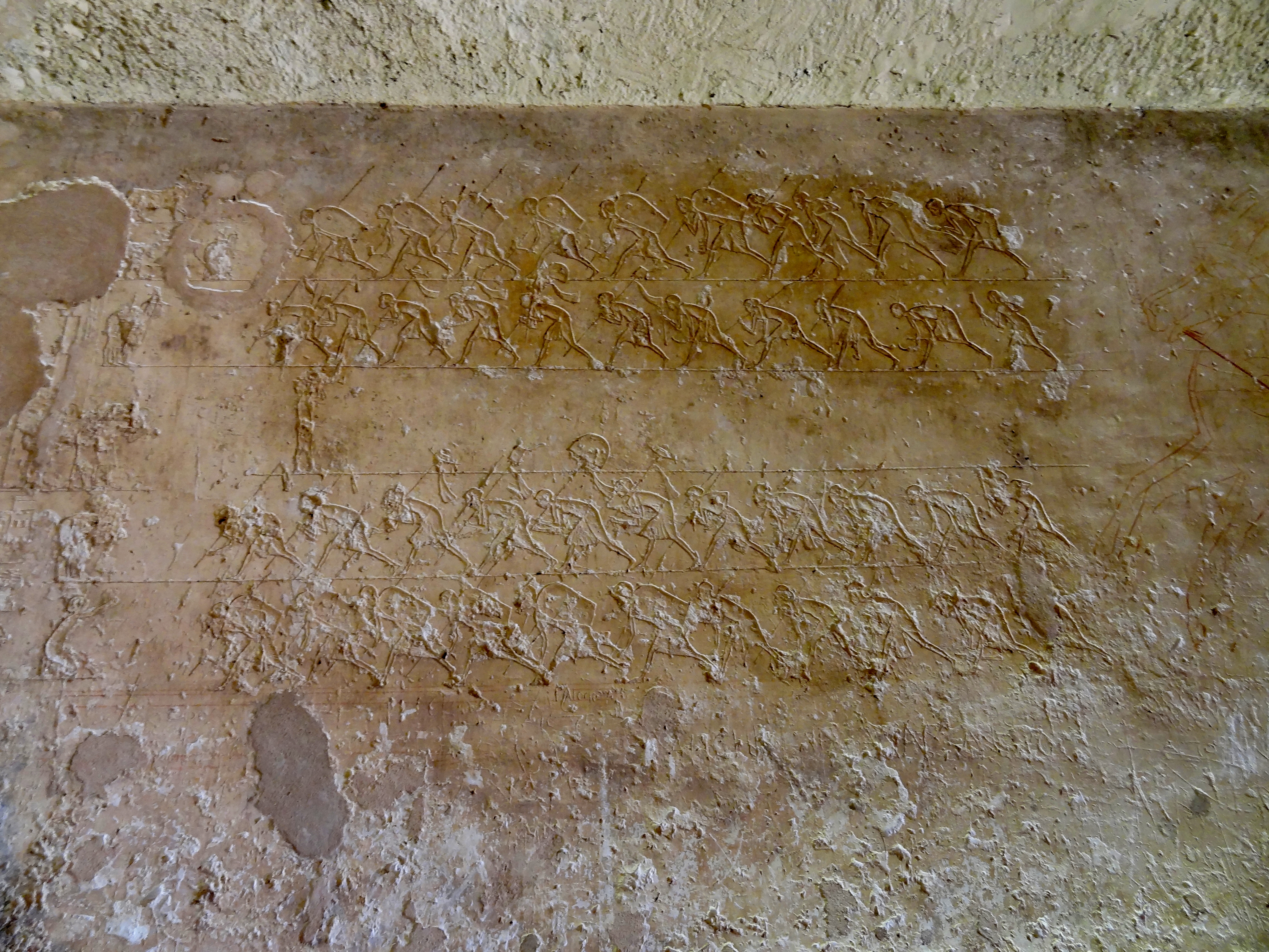 Grab des Ahmose (TA 3) in Tell el-Amarna, Ägypten